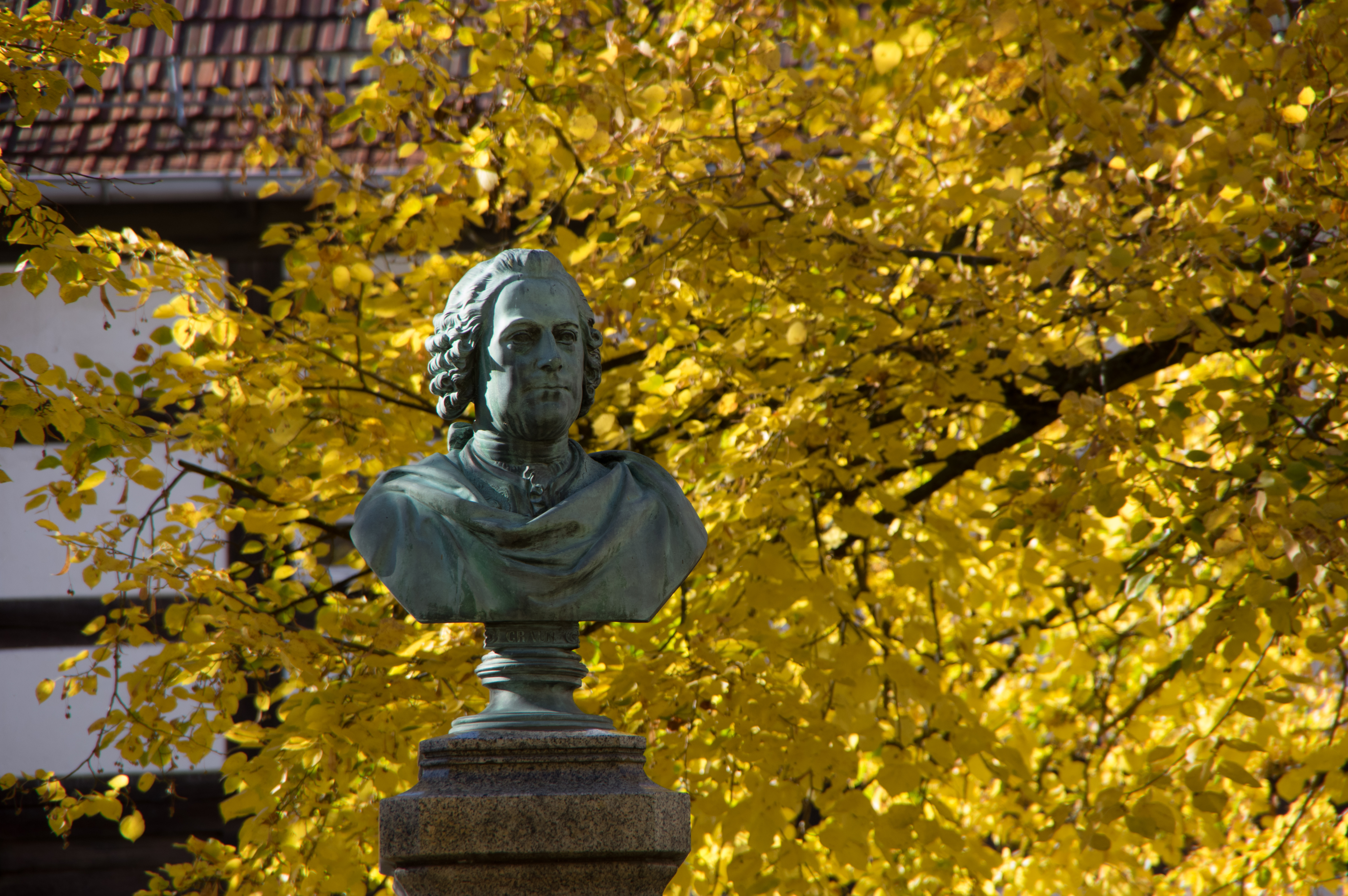 Uebigau-Wahrenbrück, Ortsteil Wahrenbrück. Das Denkmal erinnert an den Carl Heinrich Graun der in Wahrenbrück geboren wurde.